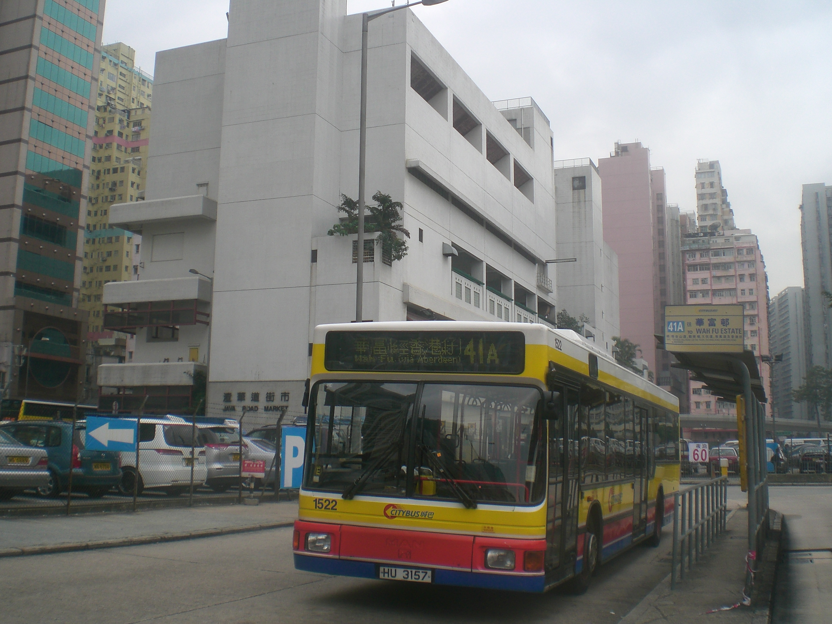 北角碼頭巴士總站